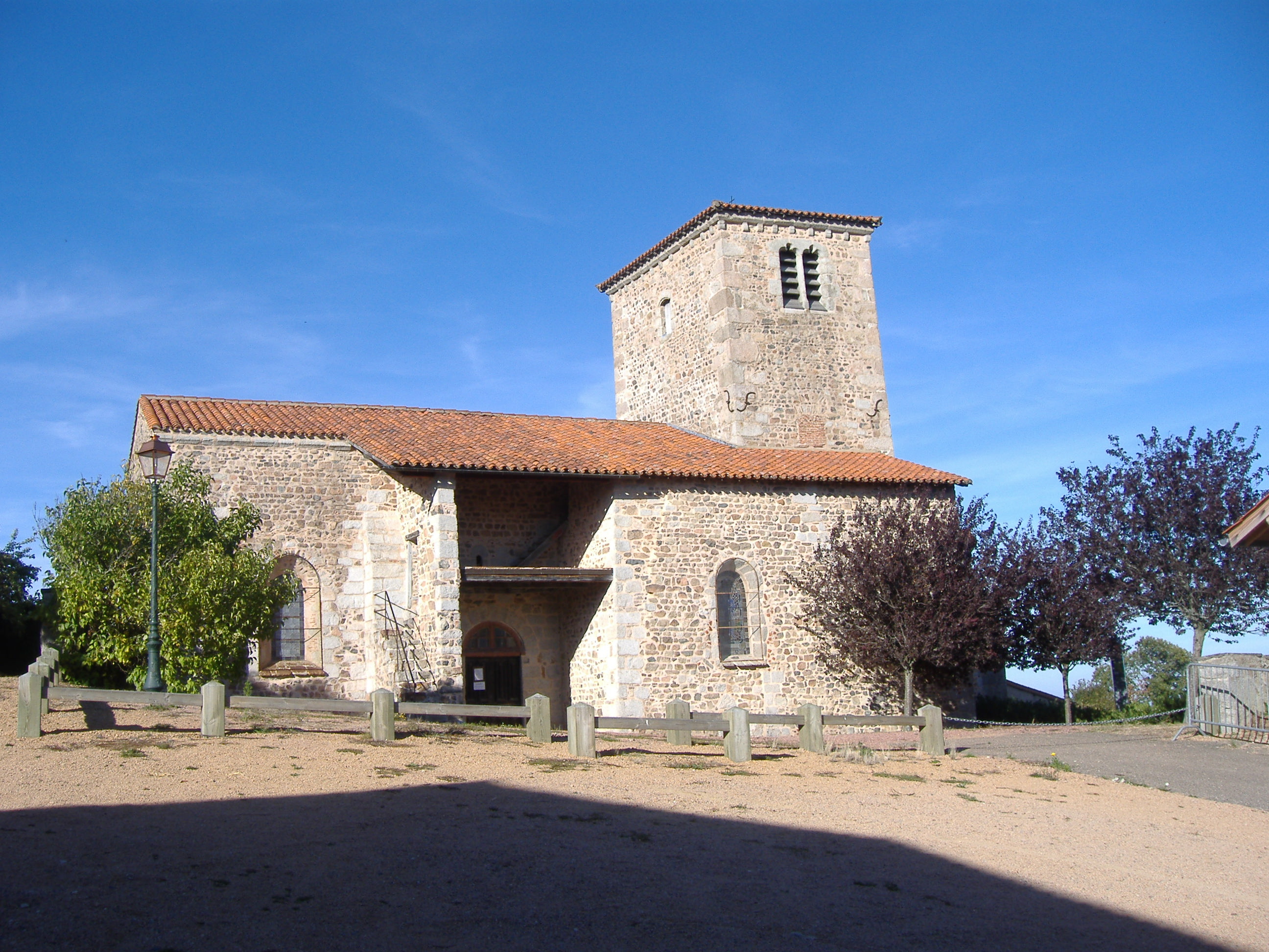 Eglise romane du Vieux Bourg de CHERIER